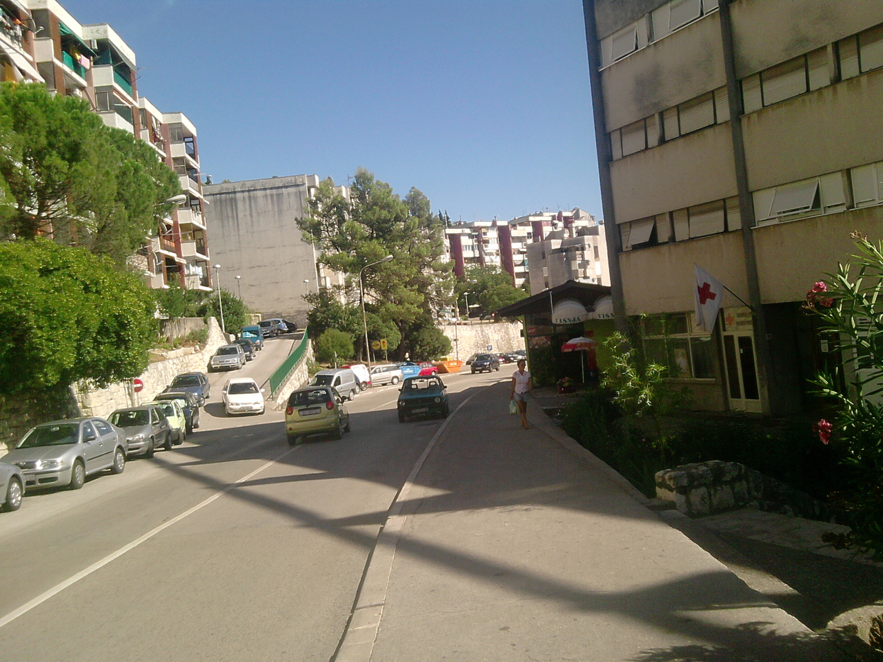 Ploče Dedinje